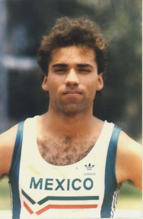 Herman Adam Negrete